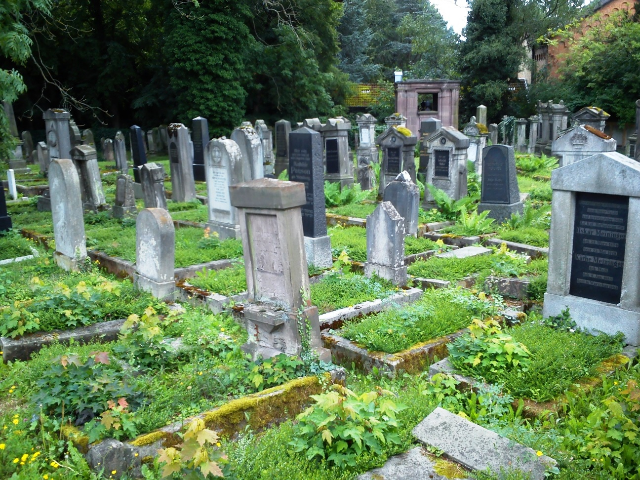 Gräber in der jüdischen Abteilung auf dem Göttinger Stadtfriedhof